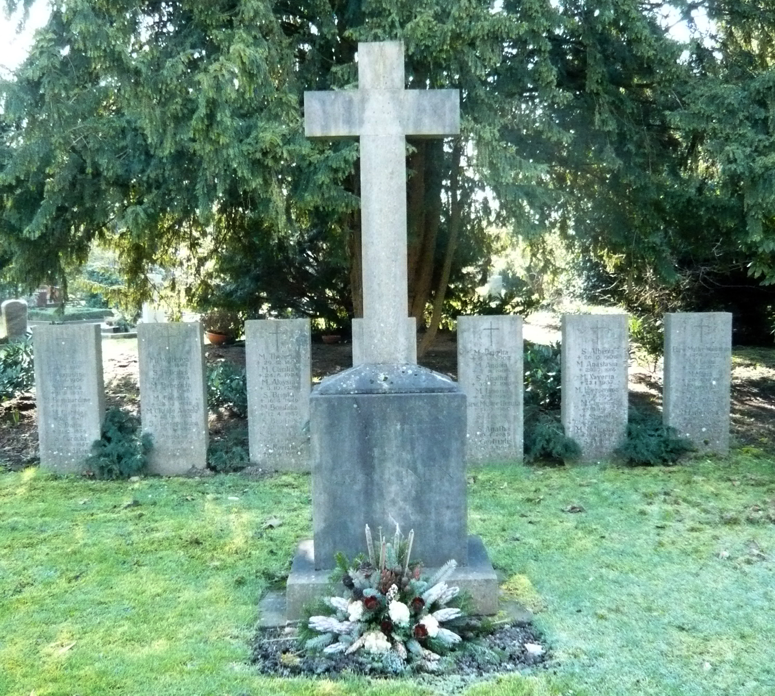 Ursulinen Grabmal Anlage, Nordfriedhof Düsseldorf